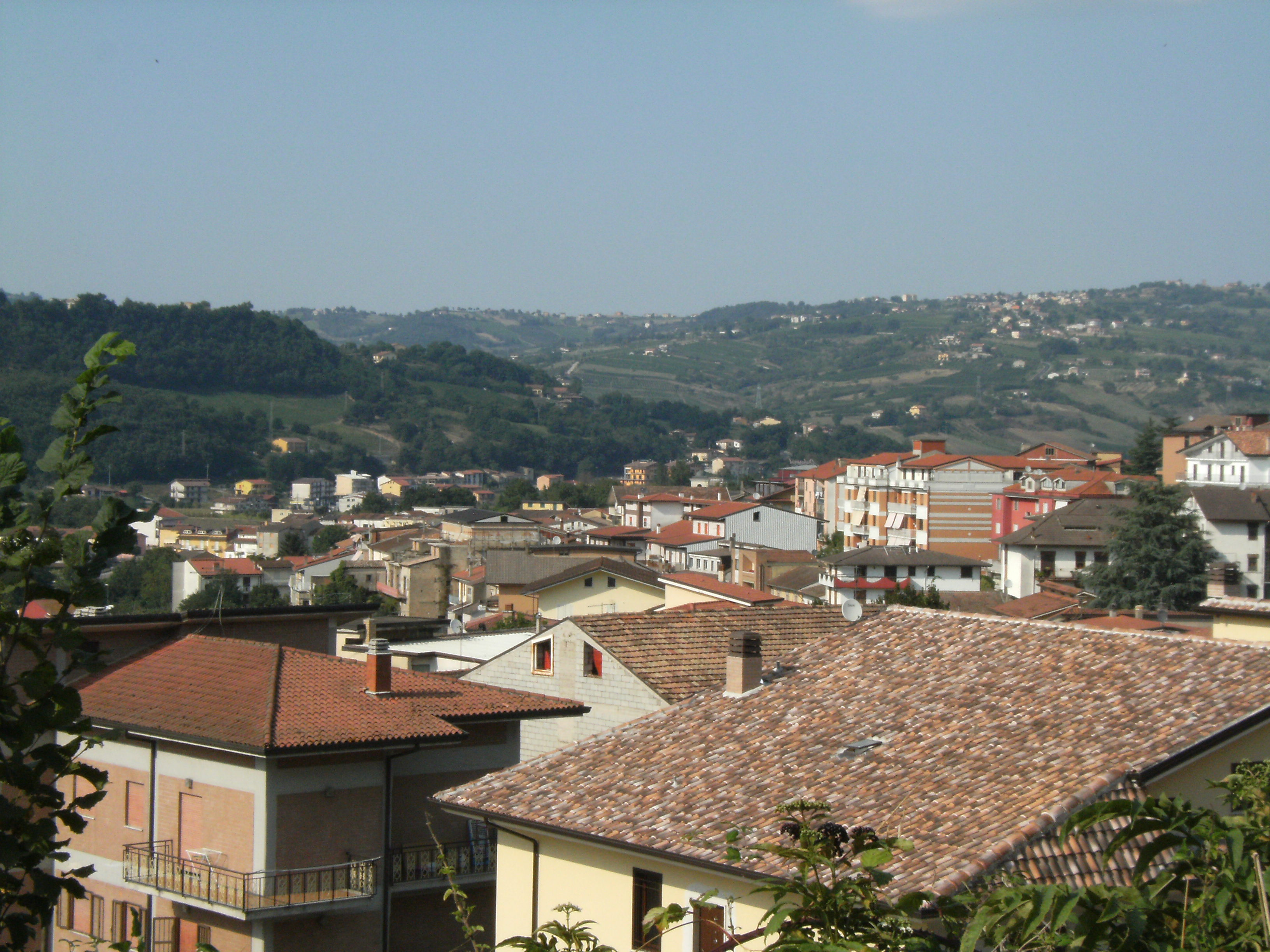 Comune di Pratola Serra - Provincia di Avellino